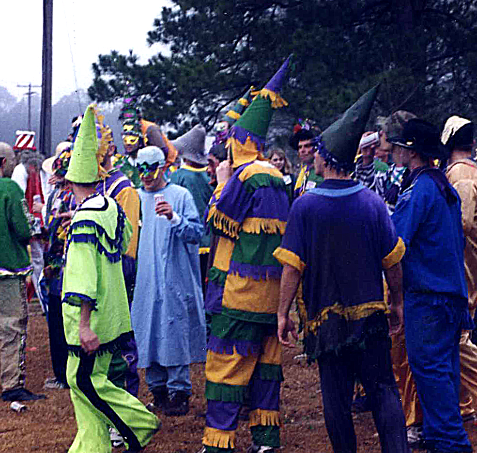 Courir de Mardi Gras, Mamou, Louisiana